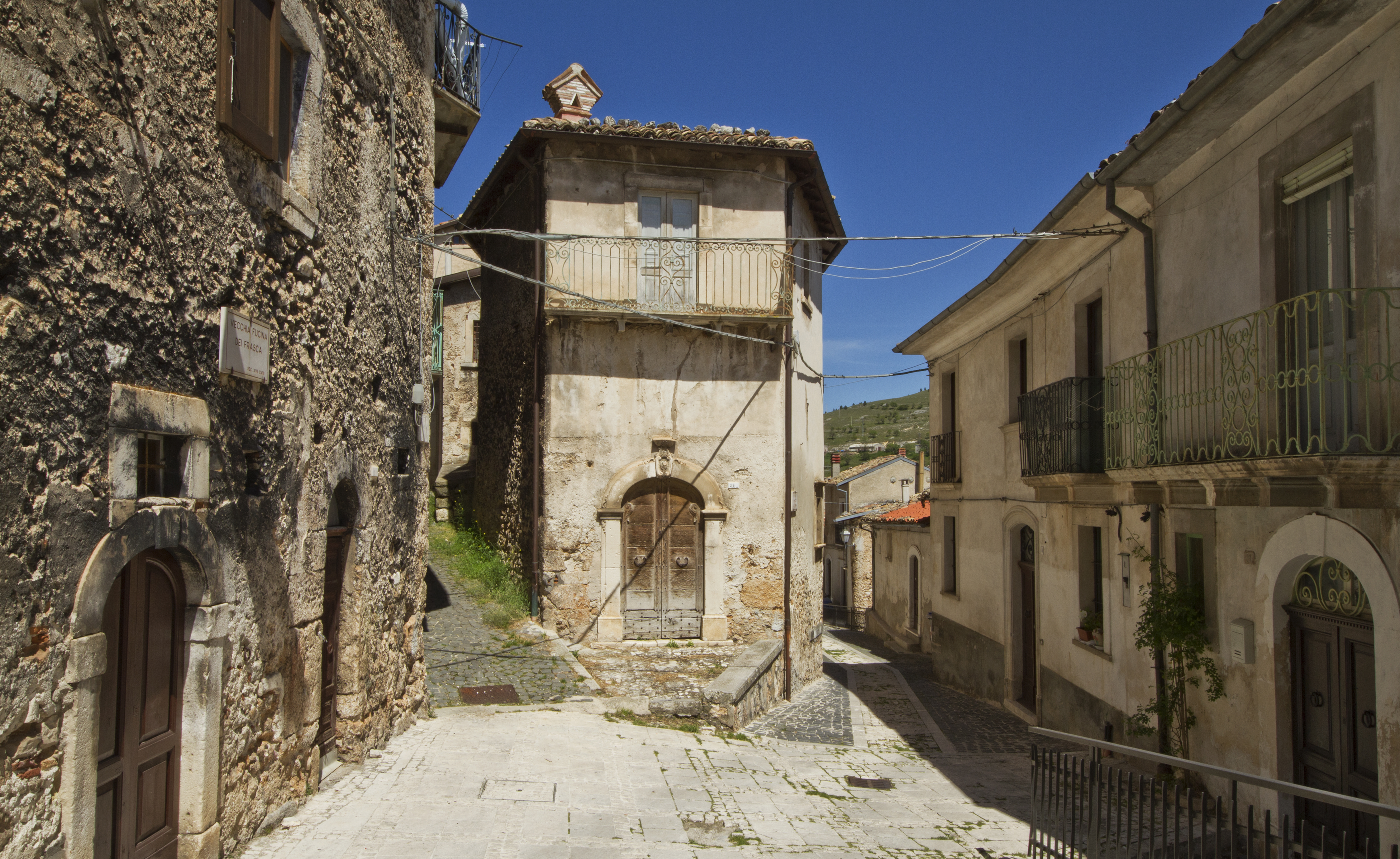 67020 Calascio AQ, Italy